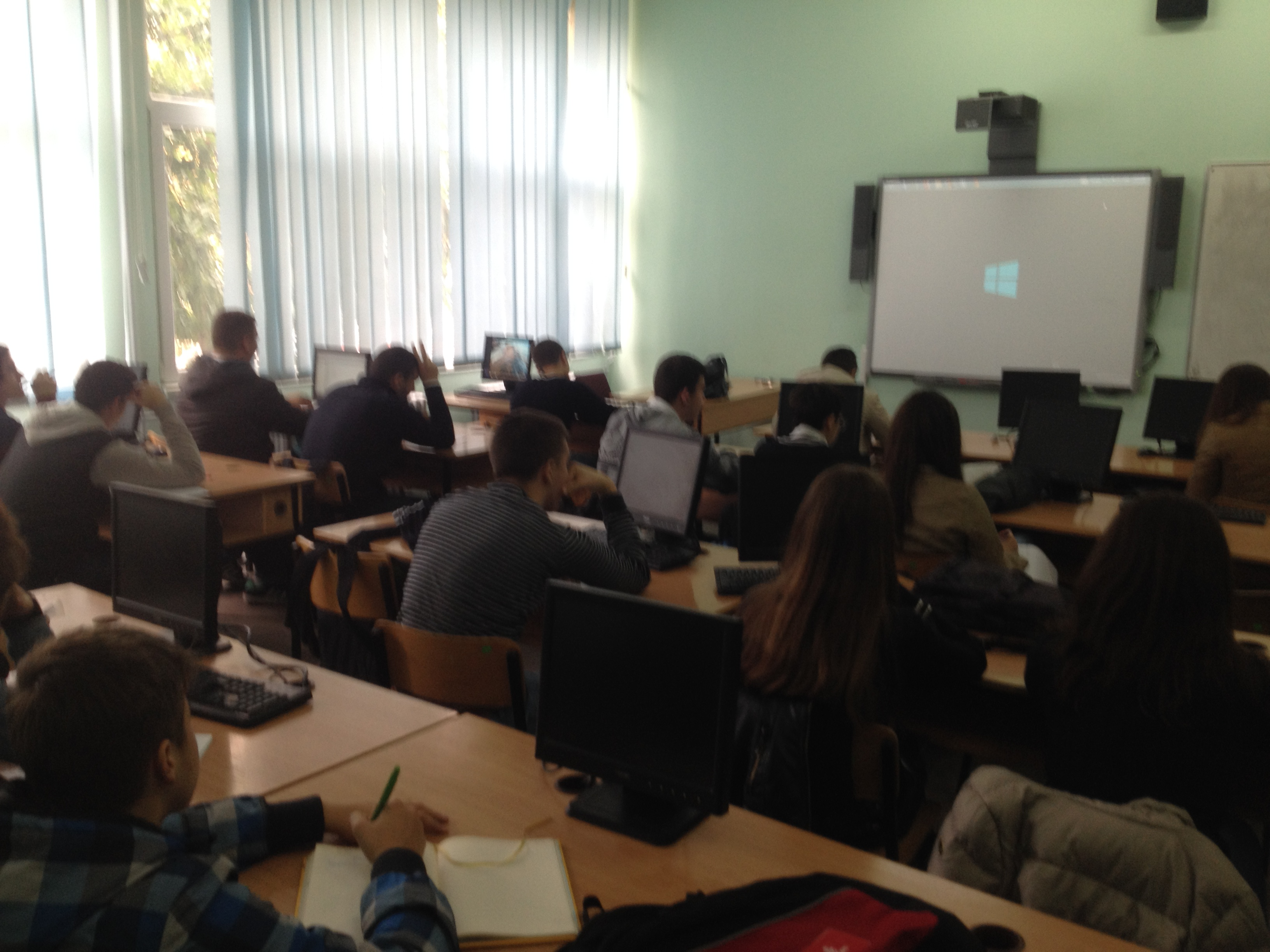 Кабинет опремен со Smart табла за држење на настава од 21виот век.